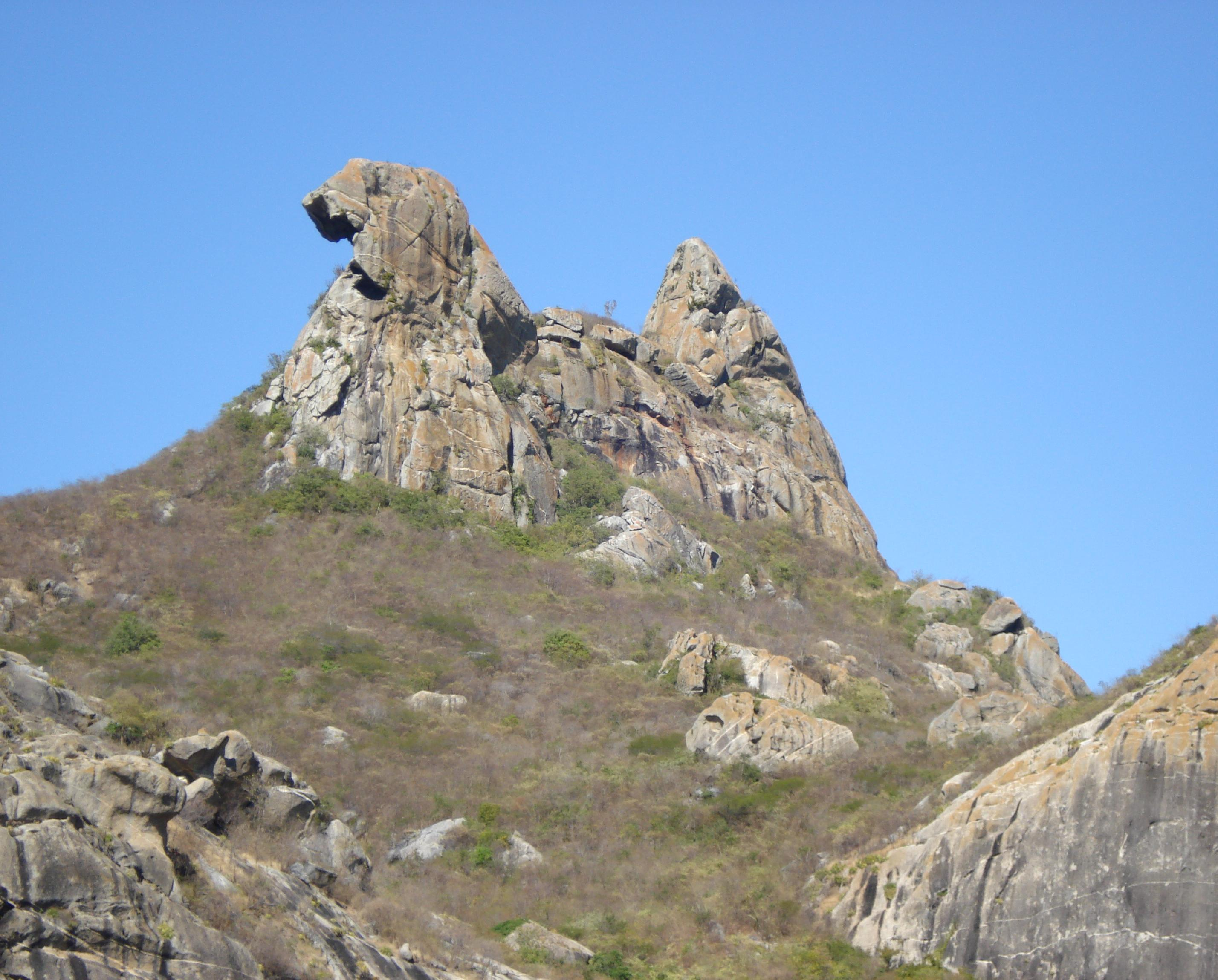 pedra da galinha choca (Quixadá, Ceará, Brasil)